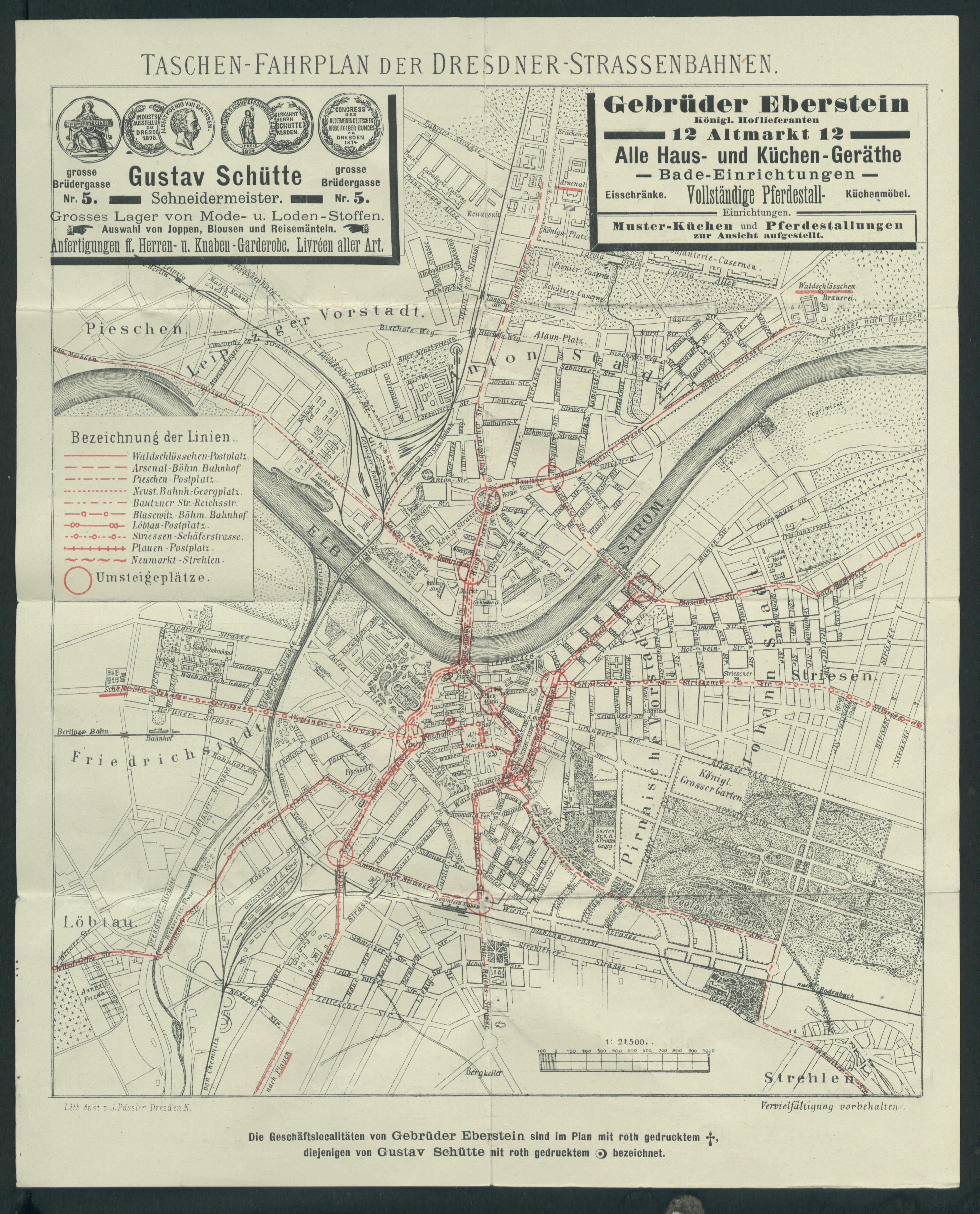 Übersichtsplan der Dresdner Strassenbahnen